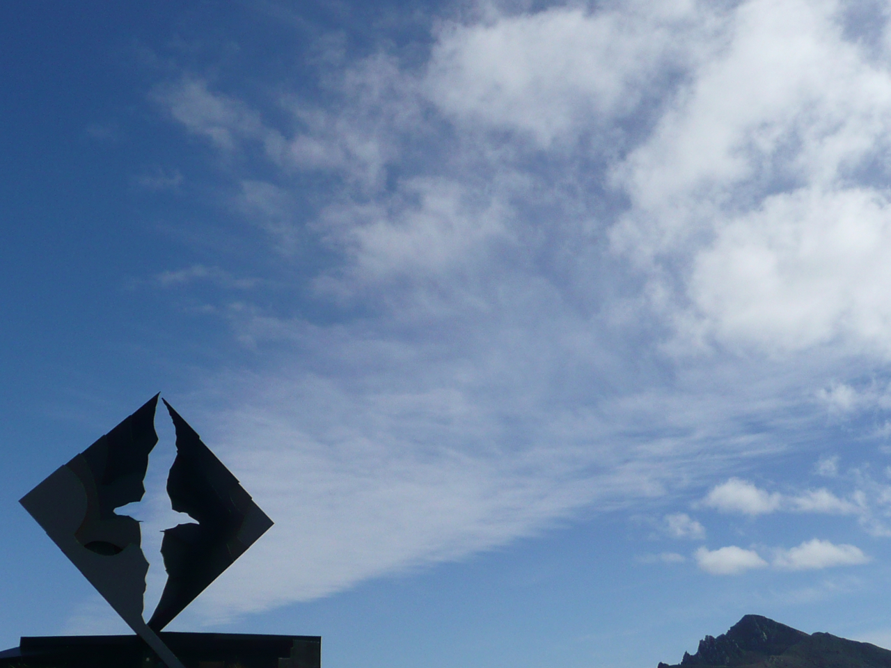 île Horn, Cap Horn : monument de l'"albatros" en l'honneur des Cap-Horniers